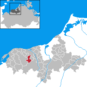 Retschow in Mecklenburg-Western Pomerania - District Bad Doberan